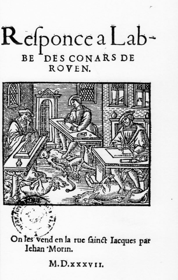 Ouvrage adressé à l'Abbé des Conars de Rouen en 1537.